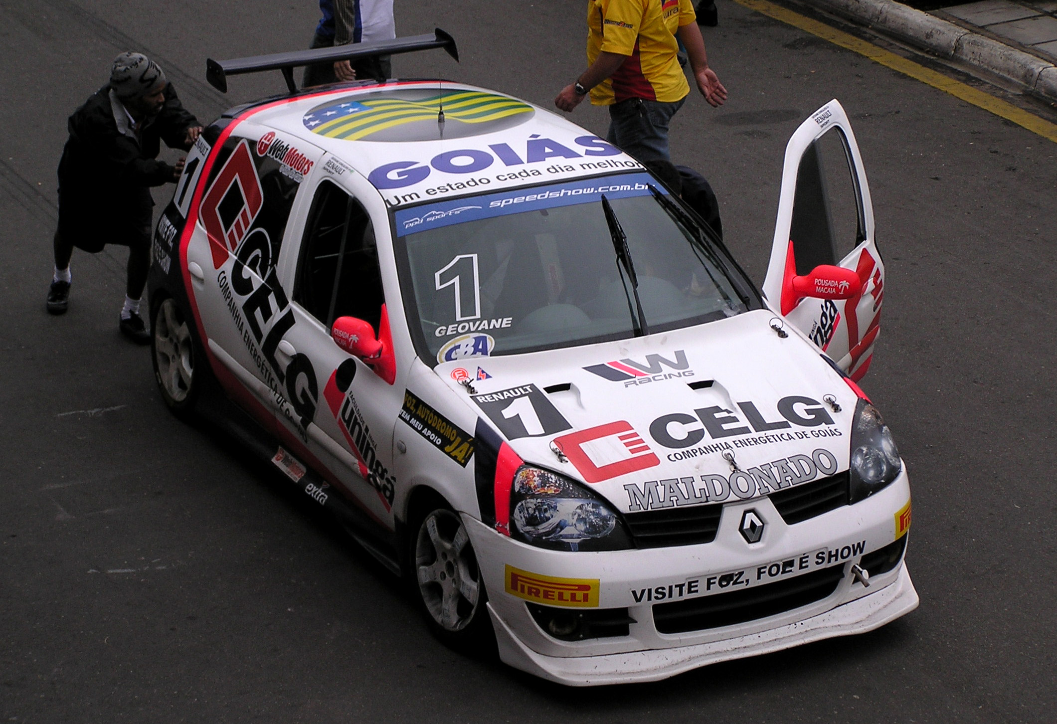 Copa Clio Brasil: Equipe W Racing.